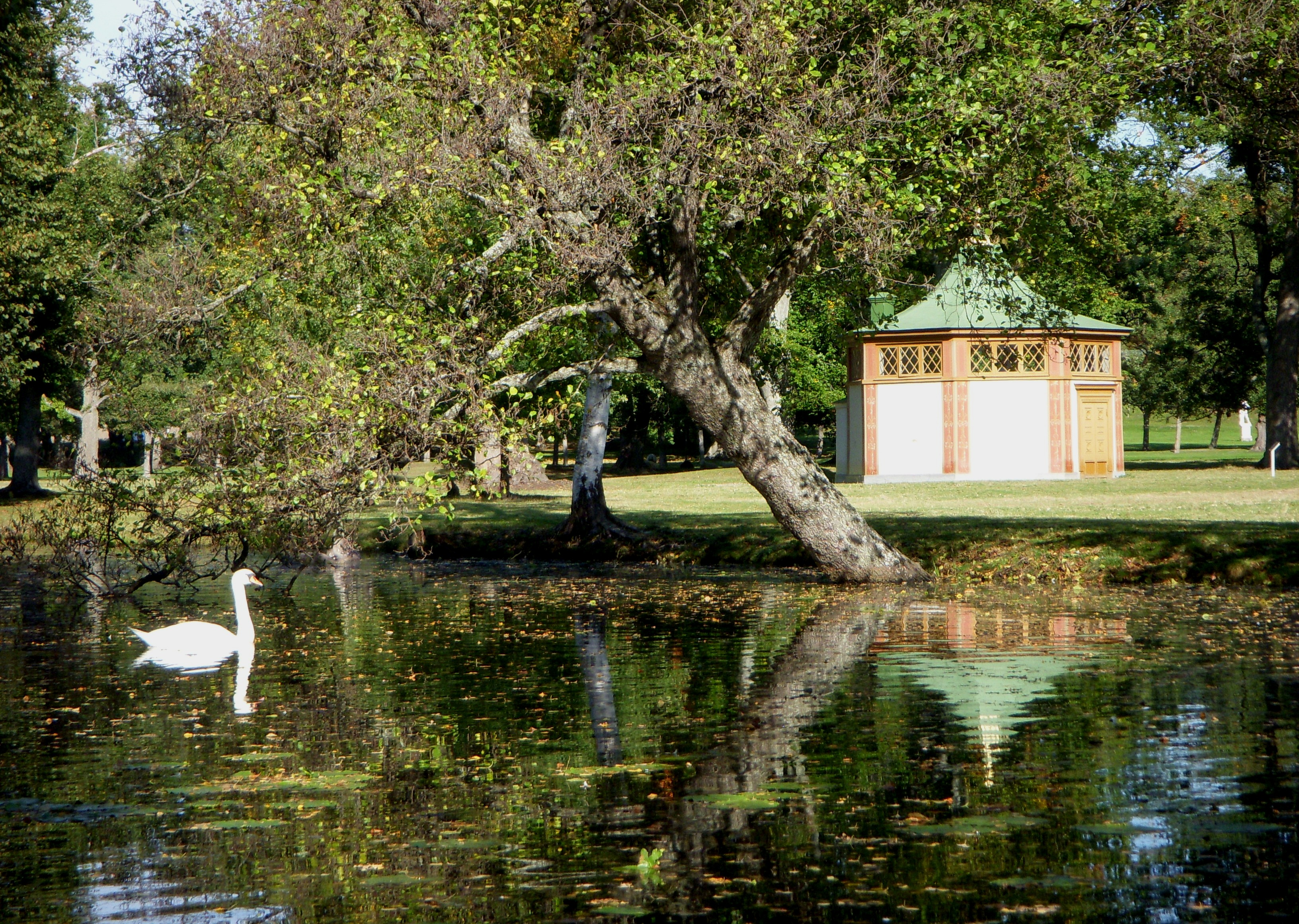 Svanholmen i Drottningholms engelska park